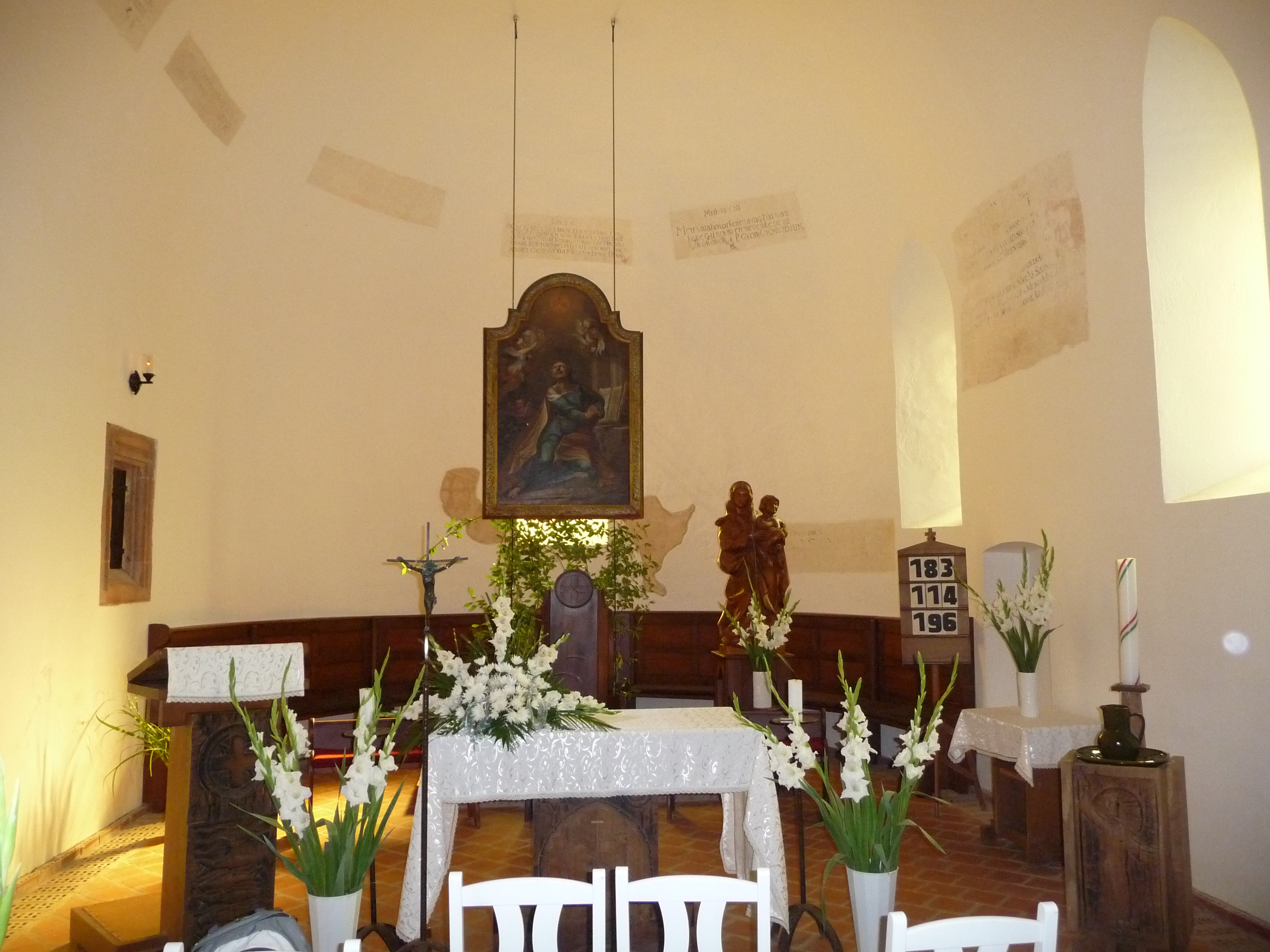 A Szent Péter-templom szentélye, Őriszentpéter